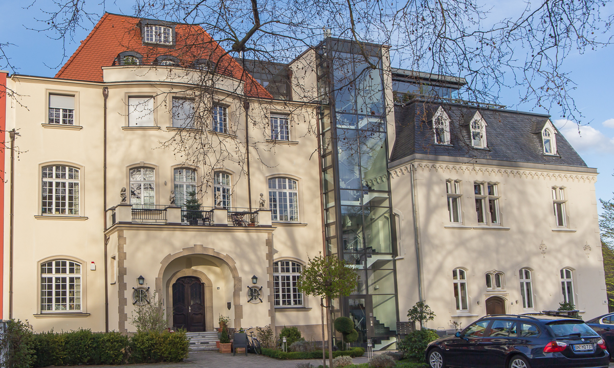 Villa Bungarten, Adenauerallee 89a (links) und Villa Schumm, Adenauerallee 89b (rechts) in Bonn